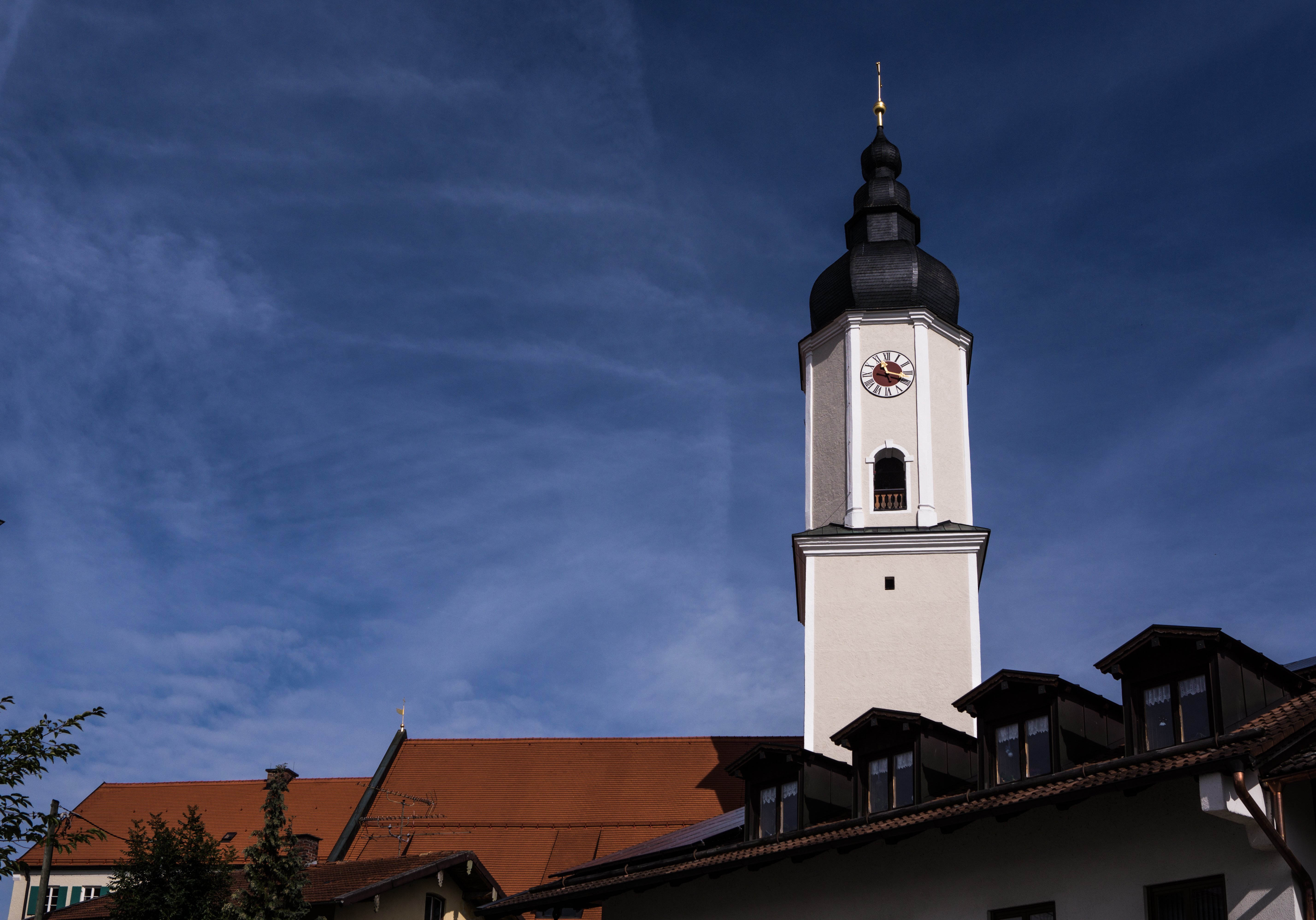 Ansicht der Kirche von Süden, Kath. Pfarrkirche Mariae Opferung, Pseudobasilika mit Satteldach, Südturm mit Welscher Haube, spätgotisch, 15. Jh. Chor und Langhaus, 1718-19 barocker Ausbau, 1734 Turmoberbau, 1847 Verlängerung um zwei Joche und zweites SeitenschiffThis is a photograph of an architectural monument.